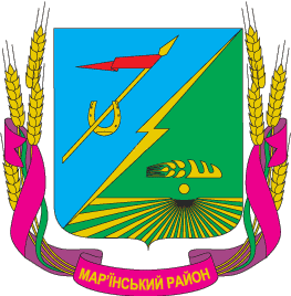 Герб Мар'їнського району